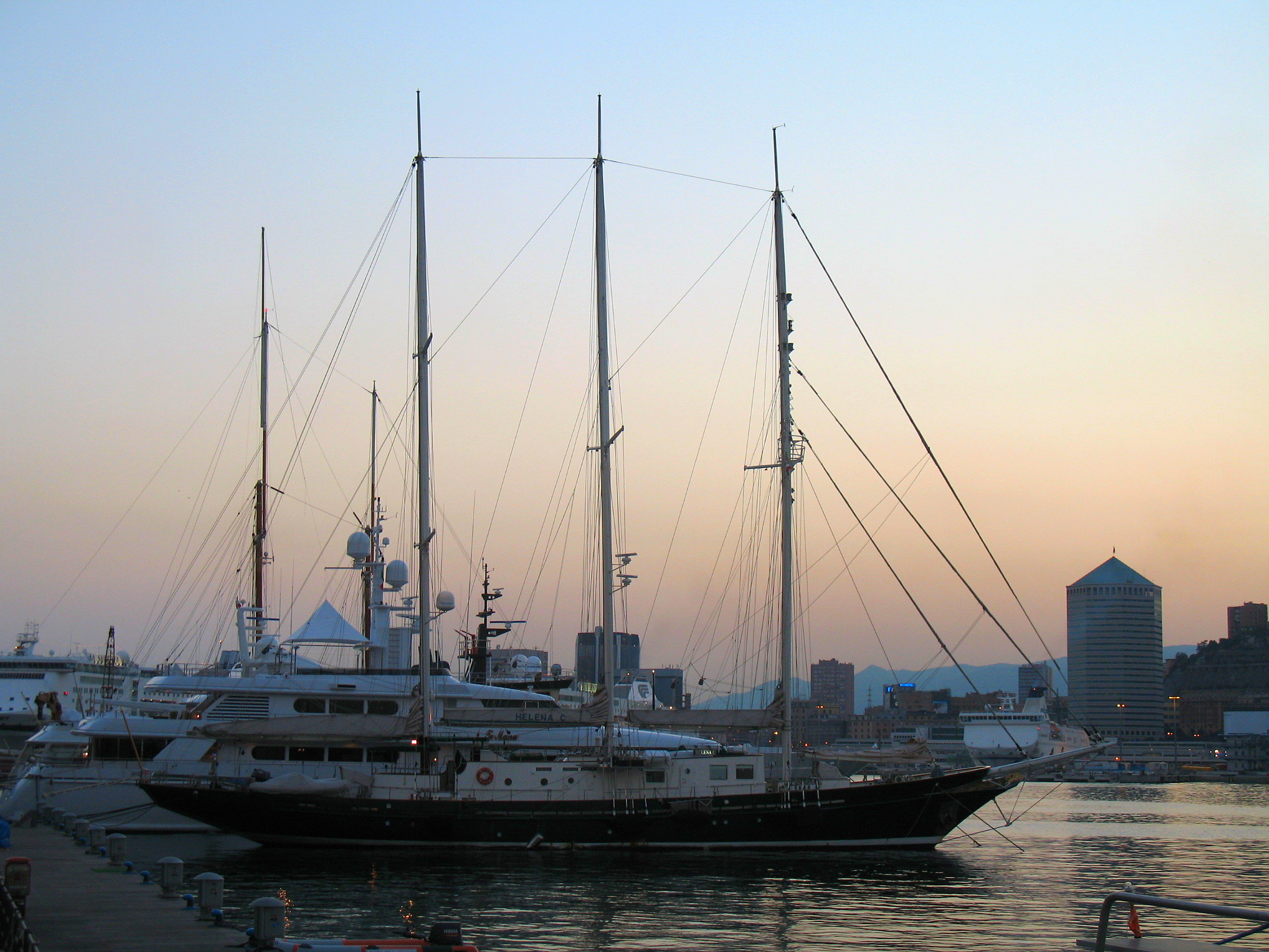 Porto antico di Genova